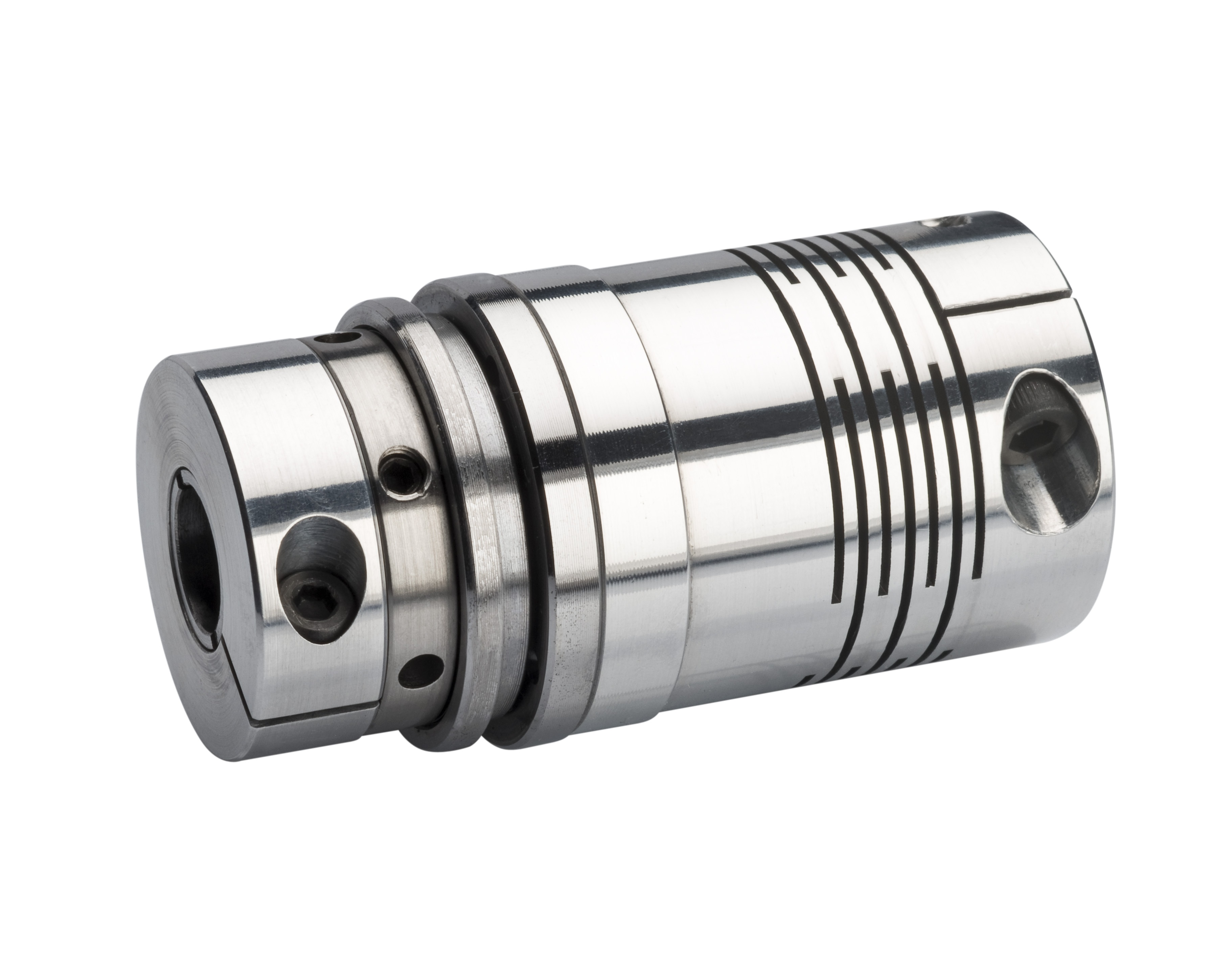 Sicherheitskupplung mit Wellenkupplungsanbau